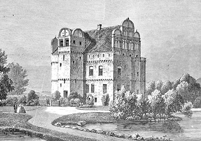 Hesselagergård er en af Danmarks ældste Herregaardsbygninger, idet den er opført 1538 af Kantsler Johan Friis († 1570), hvis Slægt ejede Gaarden indtil 1679. Nu tilhører den Sognepræst H. H. Møller.